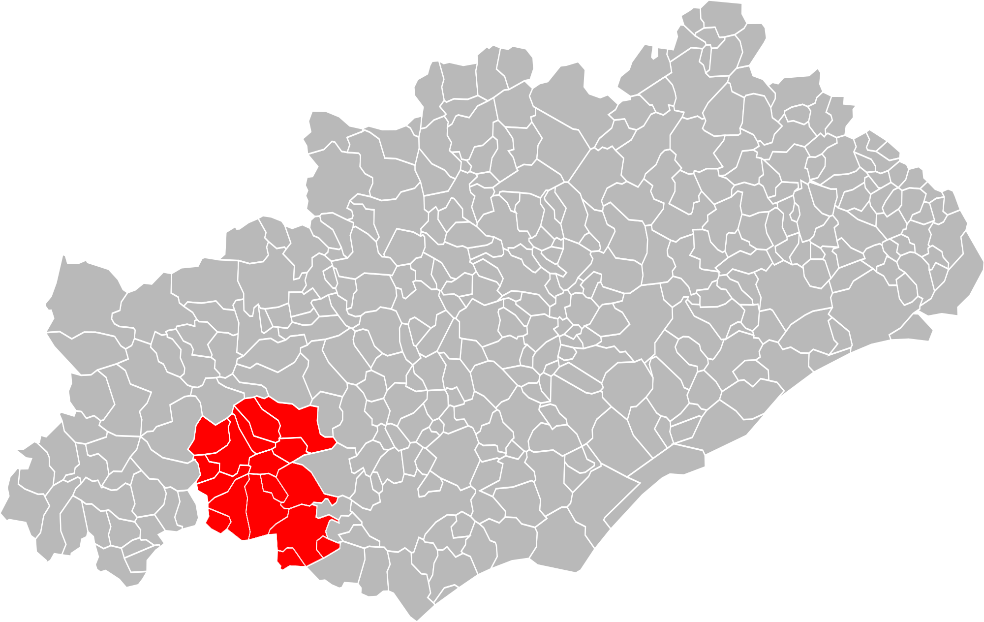 Localisation de la communauté de communes Sud-Hérault dans l'Hérault, France